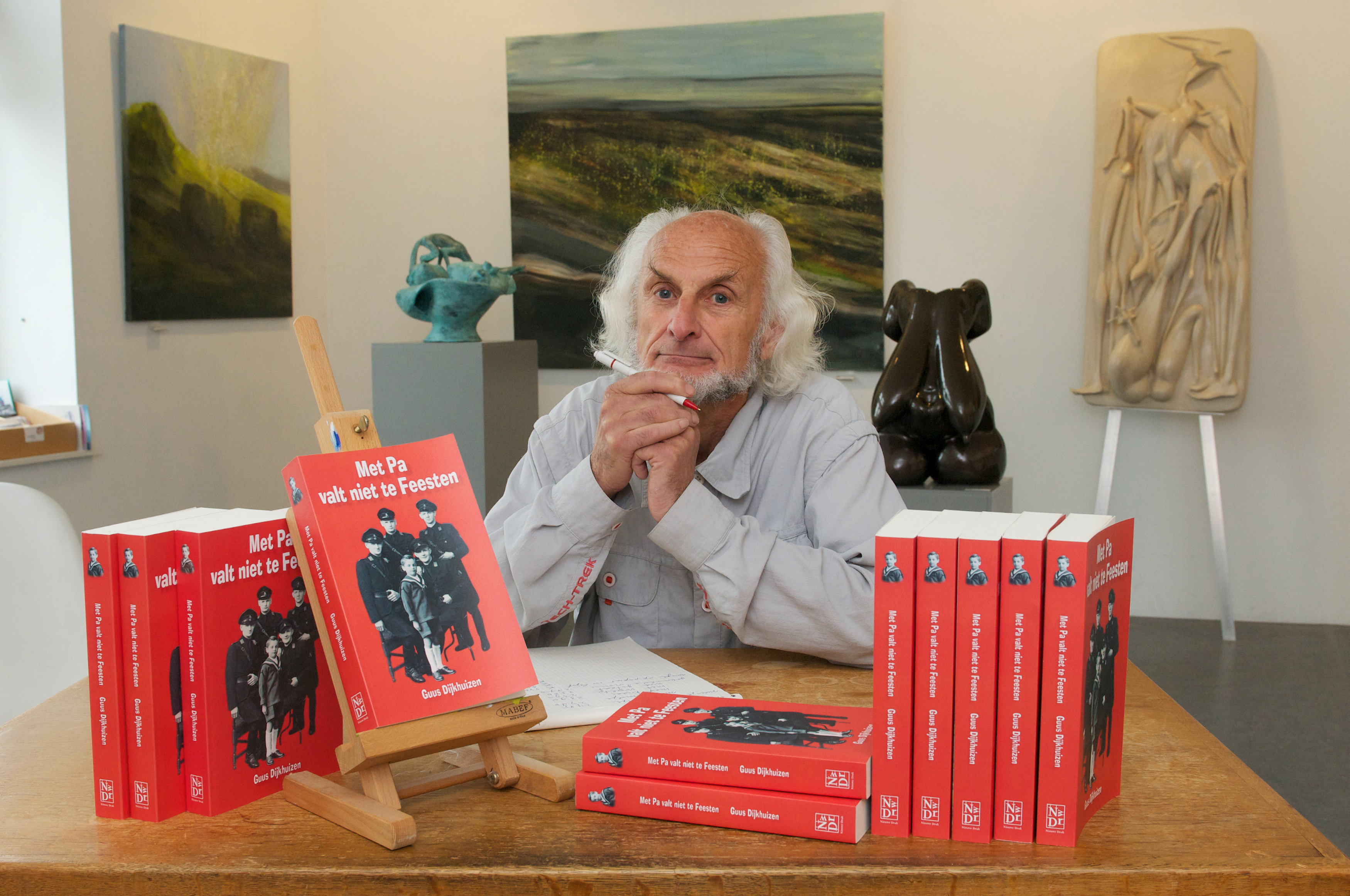 Velp, 14 september 2012. Guus Dijkhuizen, galeriehouder in Velp, schreef een roman over zijn jeugd als kind van een NSB'er en de oorlogstijd Versie voor papieren krant Foto Marc Pluim